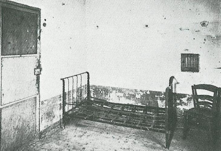 Vincent van Goghs Zimmer in der Nervenheilanstalt Saint-Paul-de Mausole in Saint-Rémy mit eisernem Bett und Stuhl.